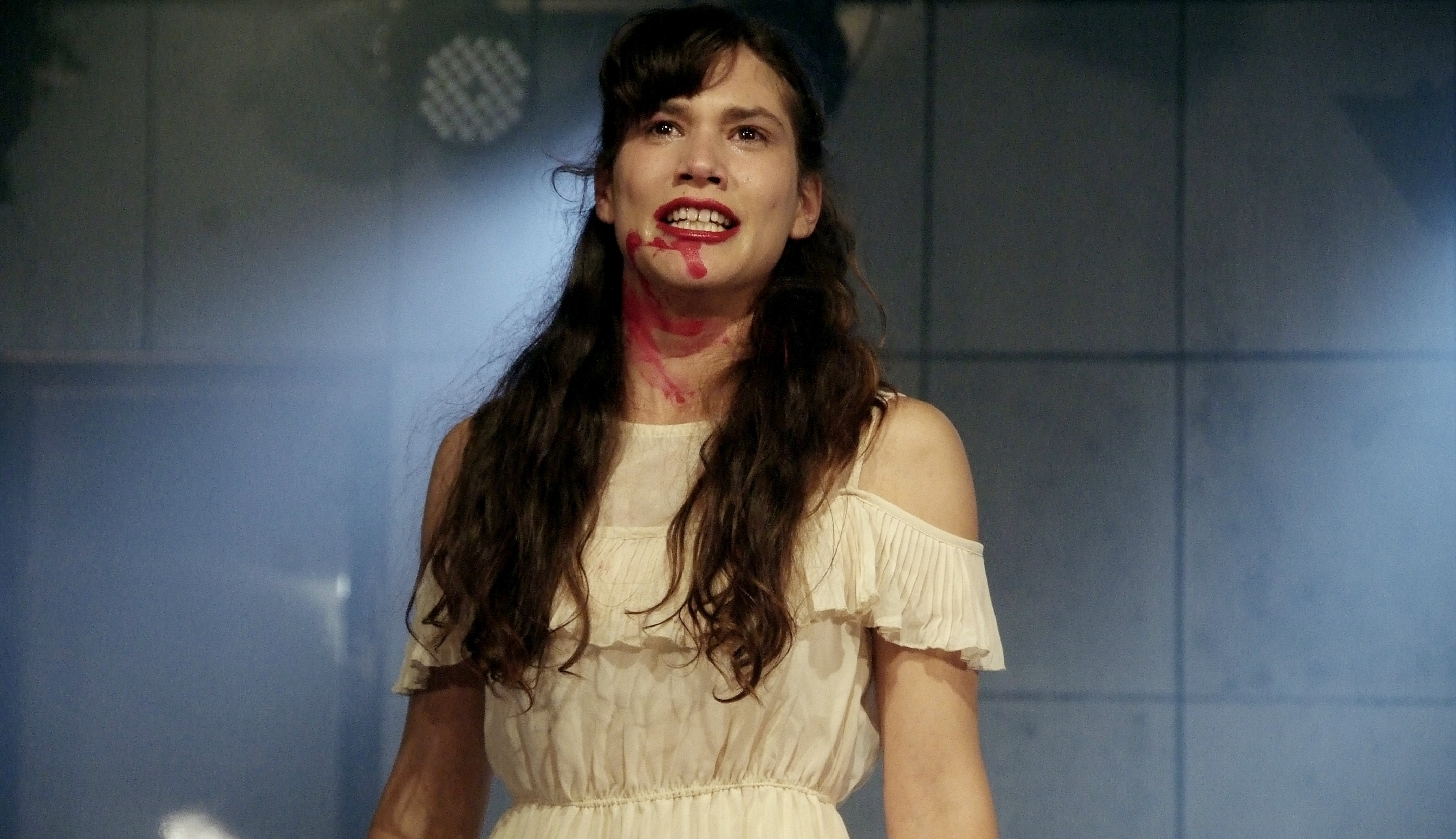 גלוריה בס בהצגה "רוברט זוקו" מאת ברנאר-מארי קולטס, בעיבודו ובימויו של רועי מליח רשף, בסטודיו למשחק ניסן נתיב, 2012